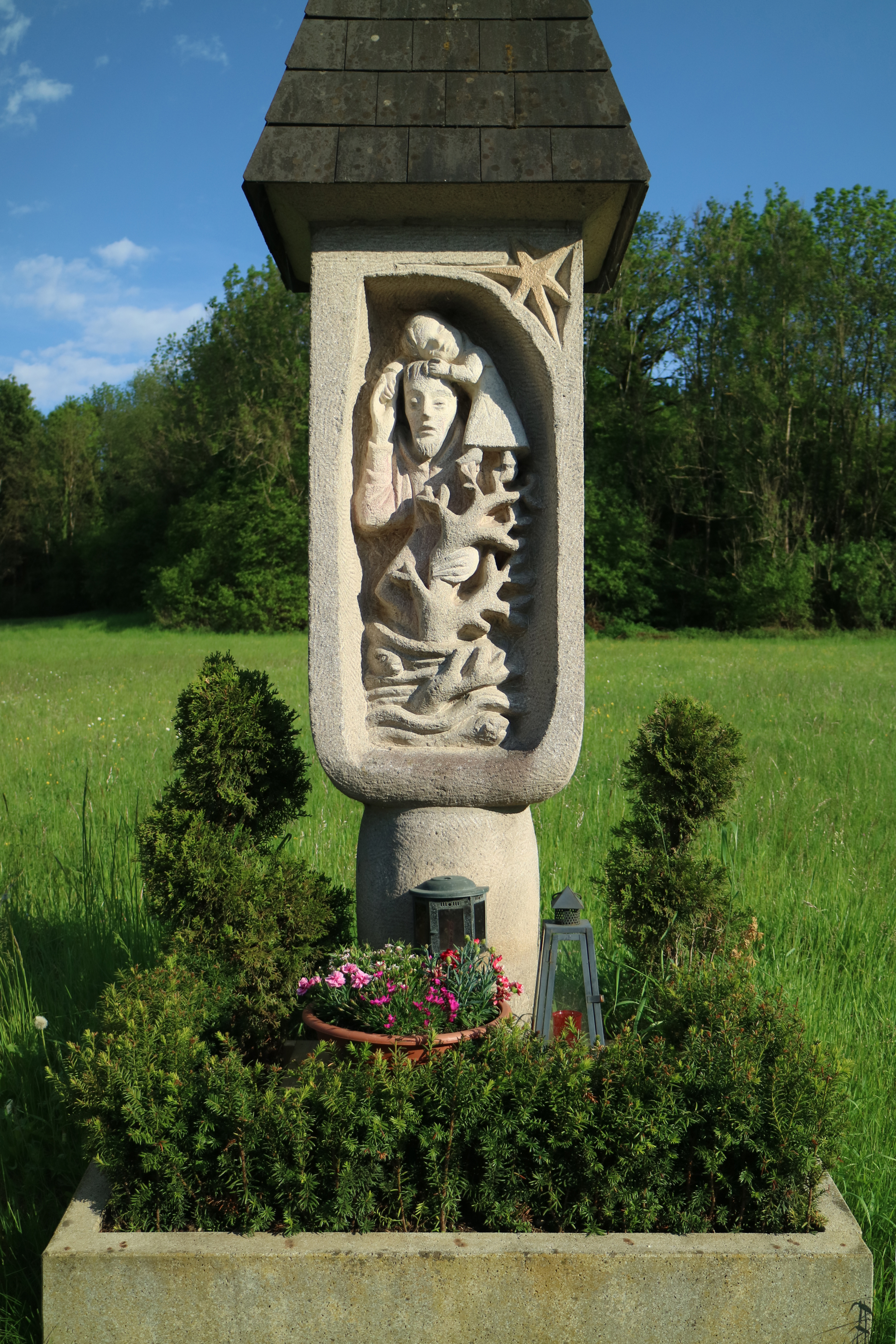 Marterl von Alfred Schlosser (1976) an der Steinbergstraße in Graz-Wetzelsdorf, zum Gedenken an den 1971 hier verunglückten Sohn der Familie Birnstingl